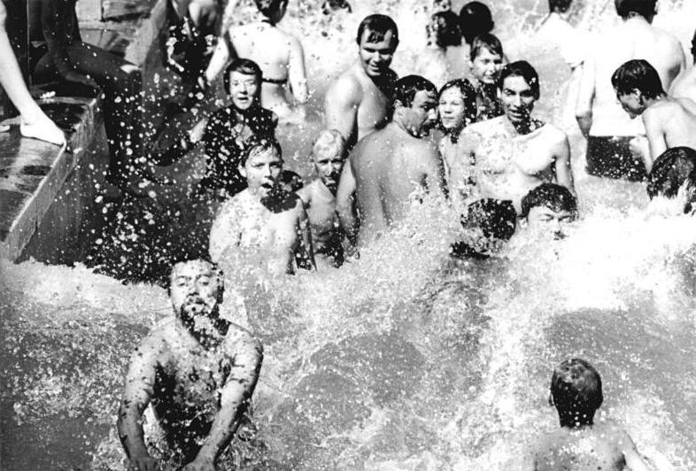 ADN-ZB Hiekel 13.8.86 Dresden: Bilz-Bad- Das älteste Wellenbad der Welt, das noch originalgetreu arbeitet, befindet sich in Radebeul bei Dresden auf dem Gelände eines ehemaligen Sanatoriums. Es wurde 1912 von Friedrich Eduard Bilz erbaut und nach ihm benannt. Das private Unternehmen wurde nach 1945 in Treuhand gegeben und ist seit 1975 volkseigen. Die Wellenmaschine steht unter Denkmalschutz, arbeitet aber noch. Bilz, der Verfasser des 1888 erstmals erschienenen Lehr- und Nachschlagewerkes "Für Jedermann an gesunden und kranken Tagen" begründete seine Lehre auf die Heilkraft der Natur, auf die Wirkung von frischer Luft und klarem Wasser. (siehe 15 und 16 N)